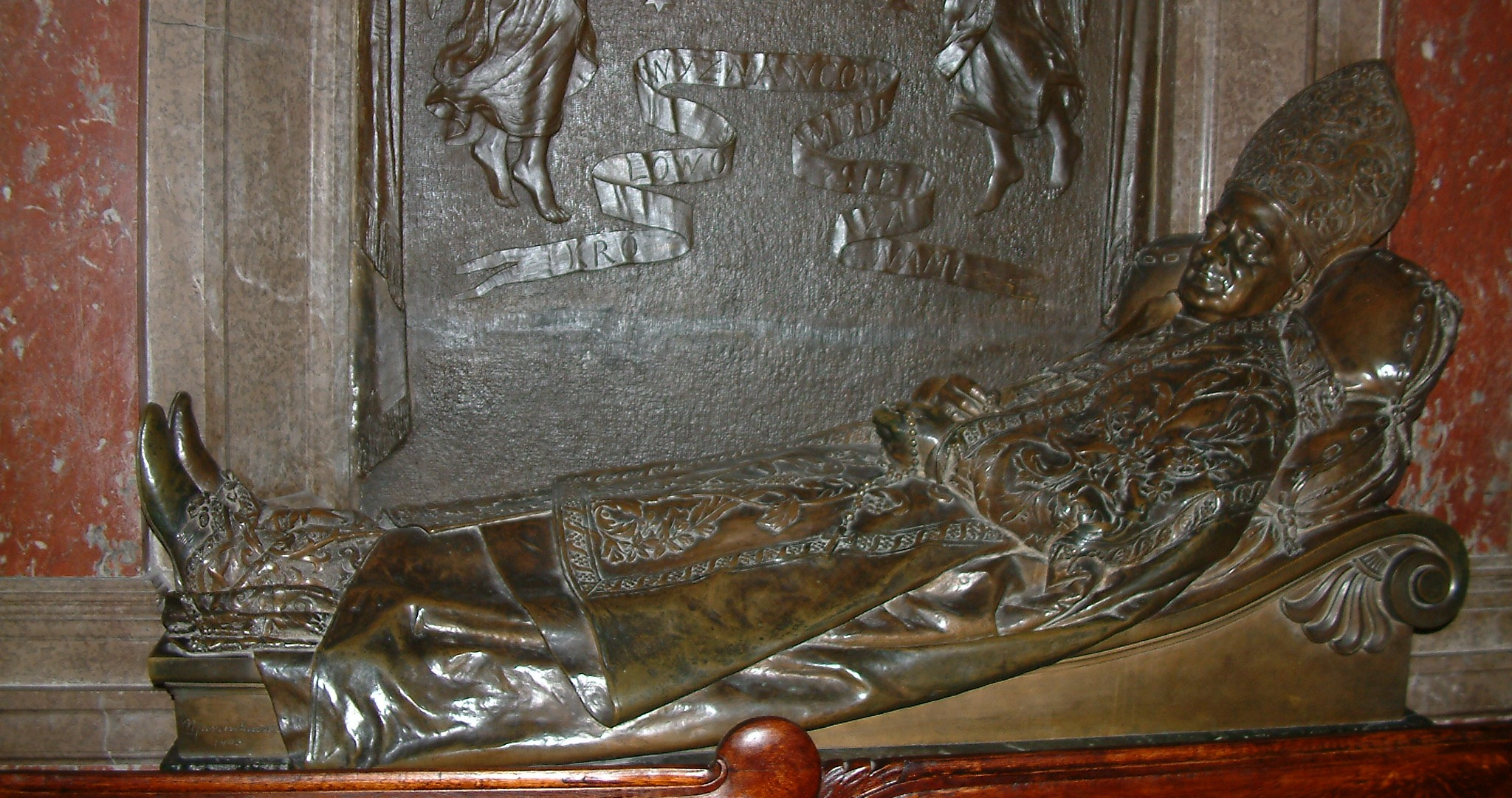 Statue of cardinal Mieczysław Ledóchowski in Poznań Archcathedral Basilica of St. Peter and St. Paul